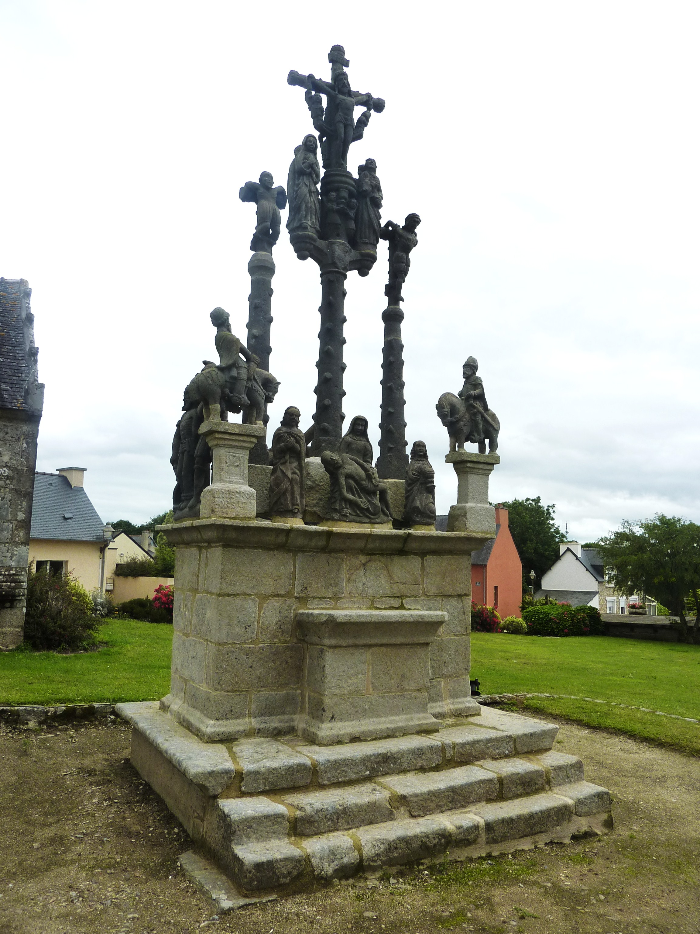 Cléden-Poher : le Calvaire, daté de 1575, vue d'ensemble